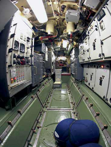 Notranjost podmornice Zeta